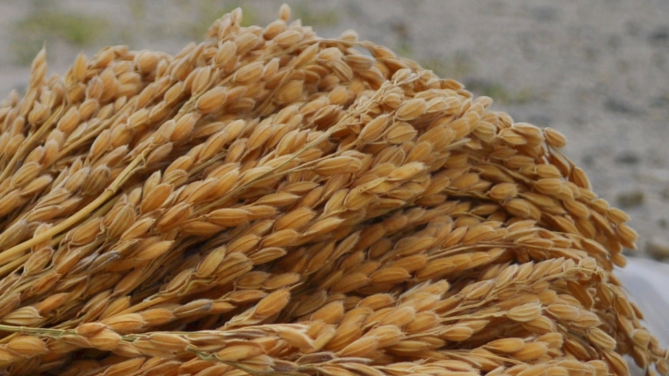 Pannocchie di riso della Varietà Storica da Conservazione Razza 77, selezionate in accordo ai processi di mantenimento in purezza varietale della semente.